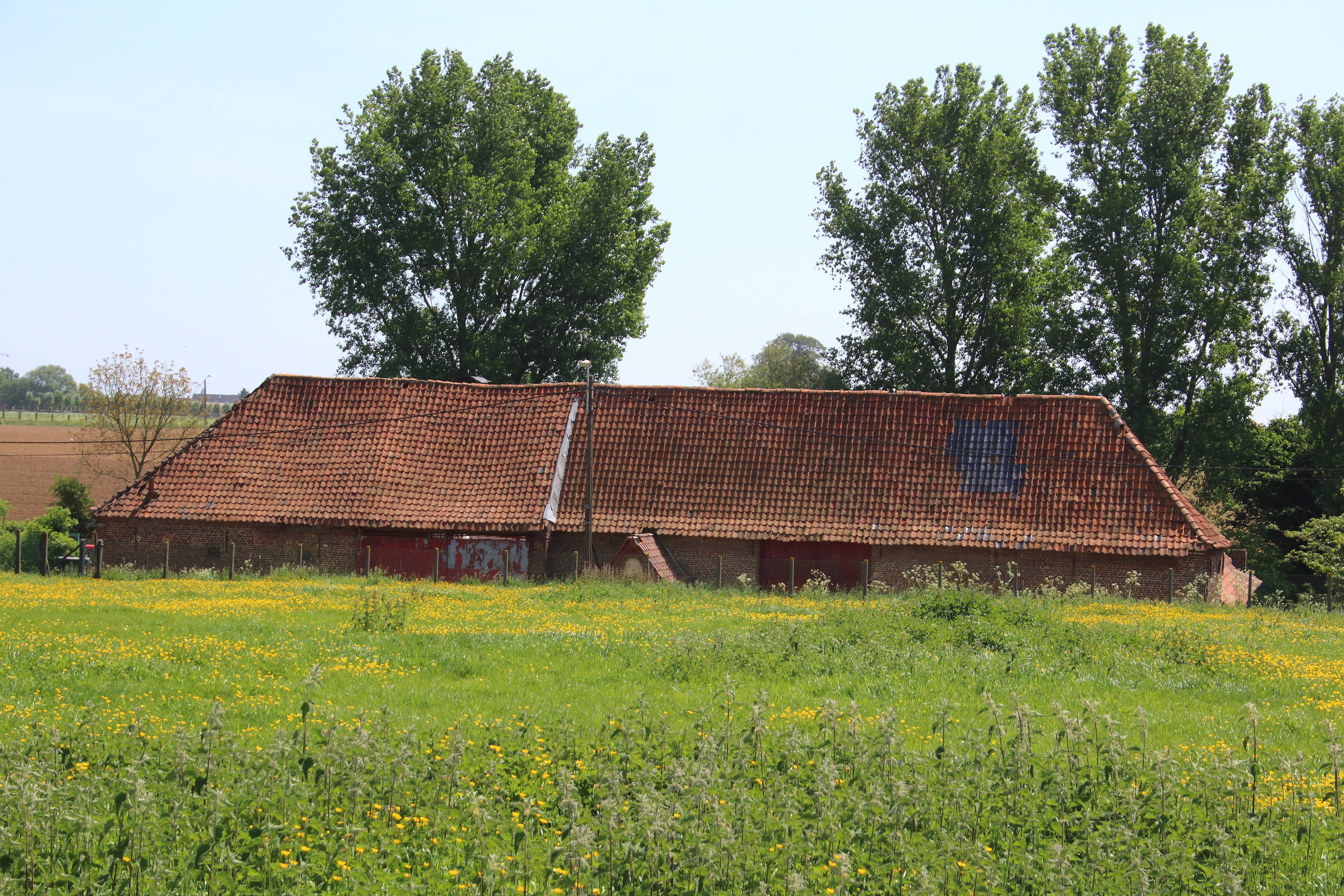 Hof ter Linden, Velzeke-Ruddershove, Zottegem, Vlaanderen, België